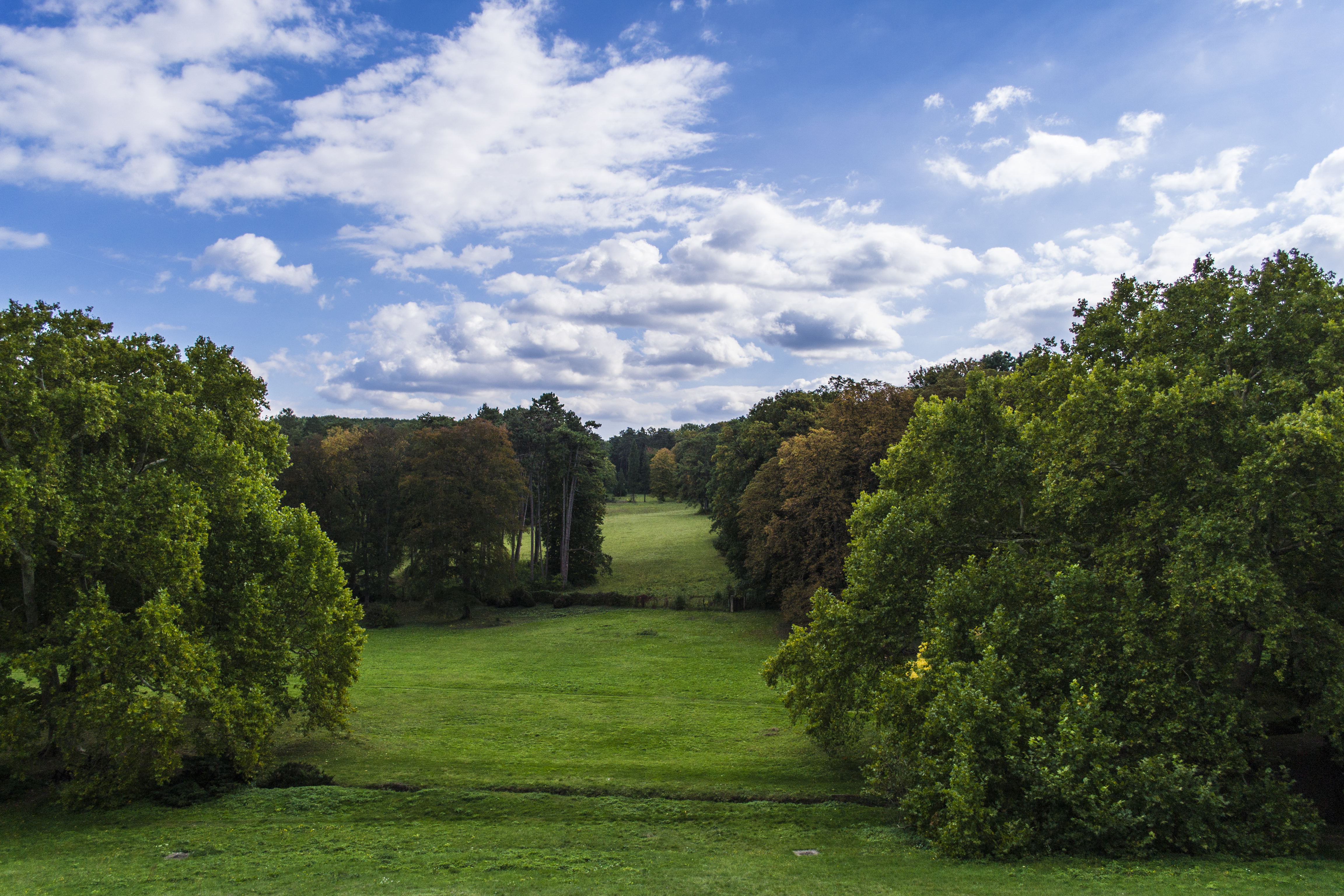 Károlyi-kastélyegyüttes és parkja, Füzérradvány – kastélypark This is a photo of a monument in Hungary. Identifier: 2768